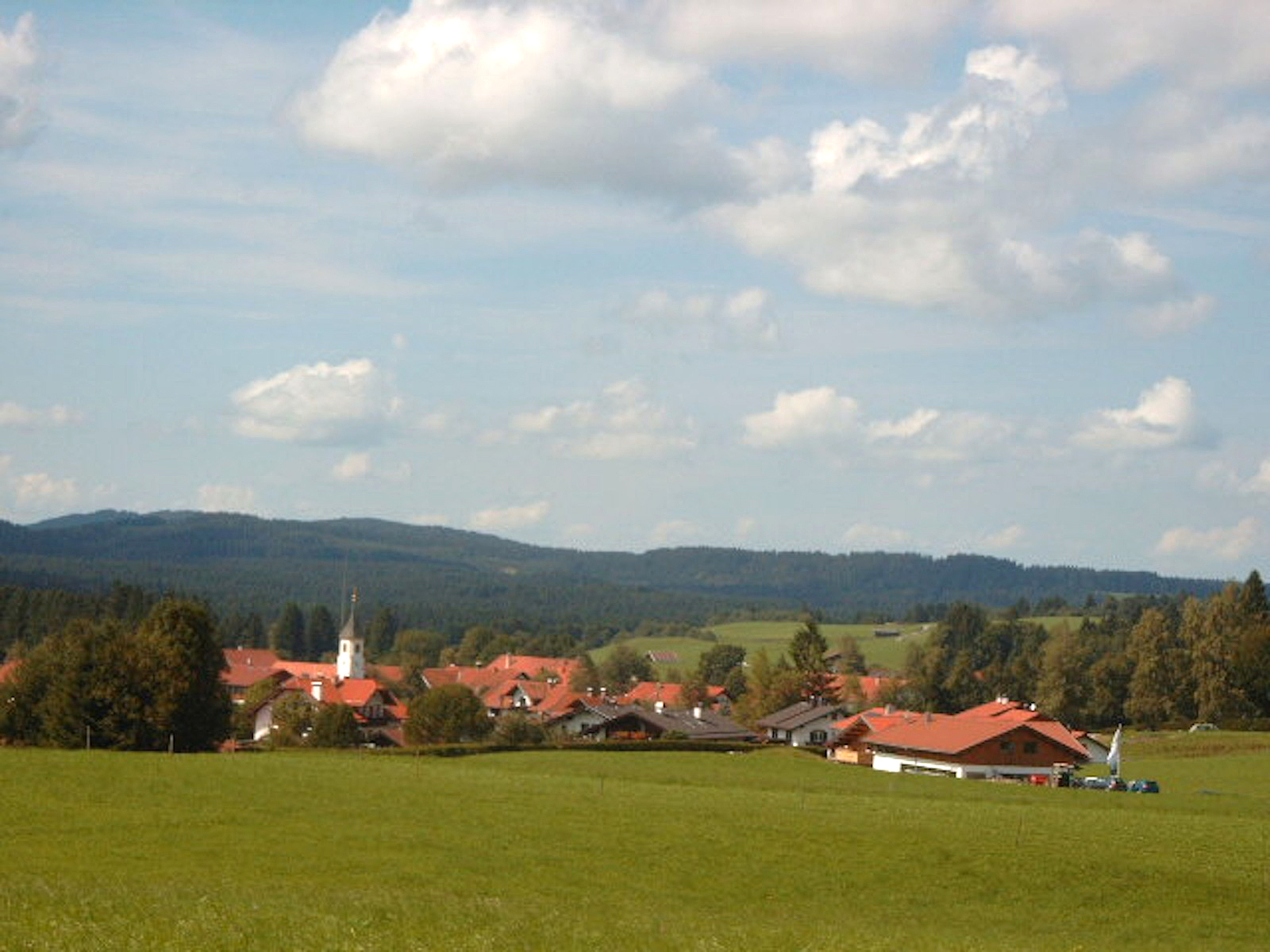 Altenau im Ammertal